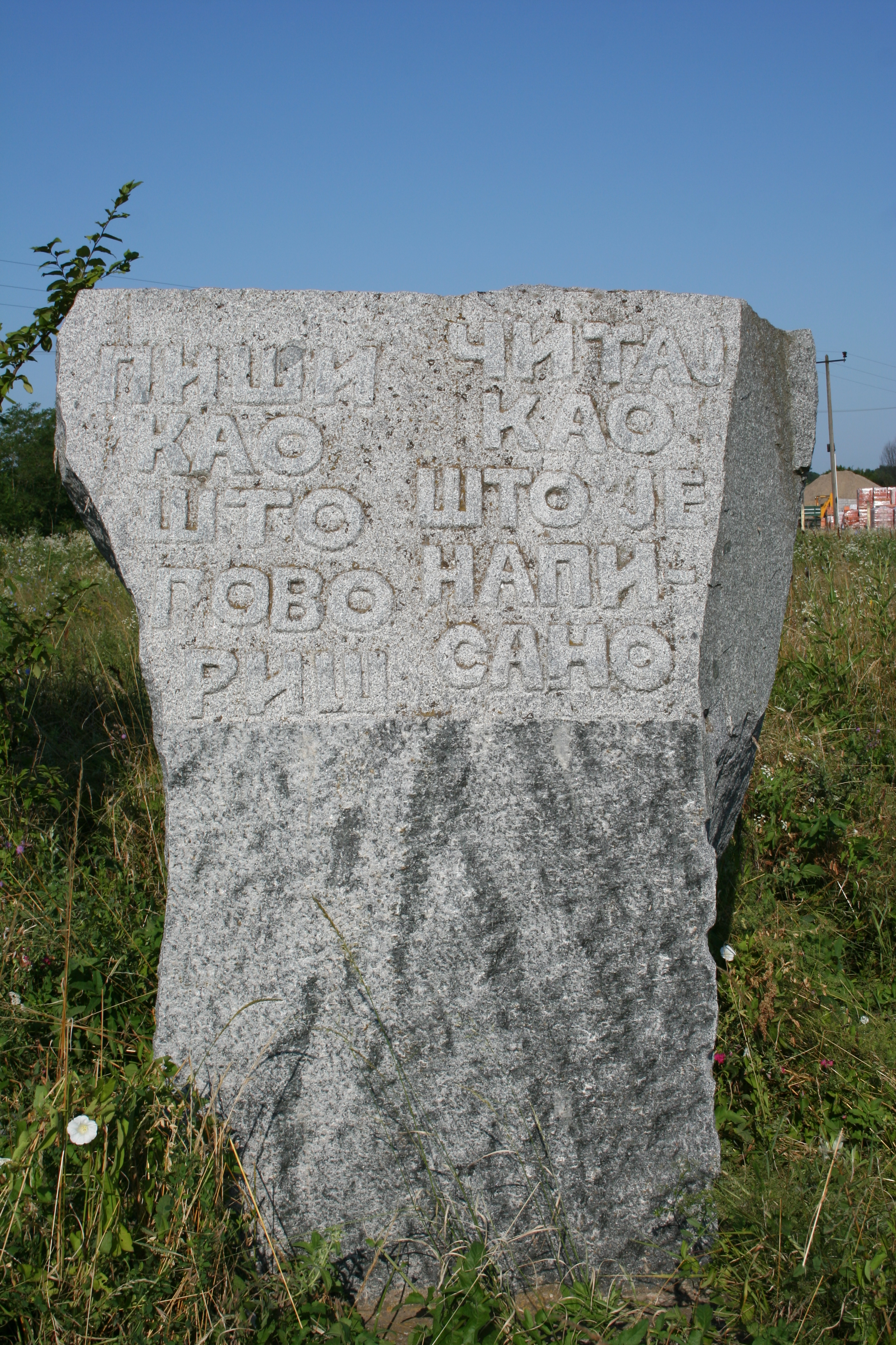 Spomenik ćirilici i Vuku Karadžiću na ulasku u selo Jalovik